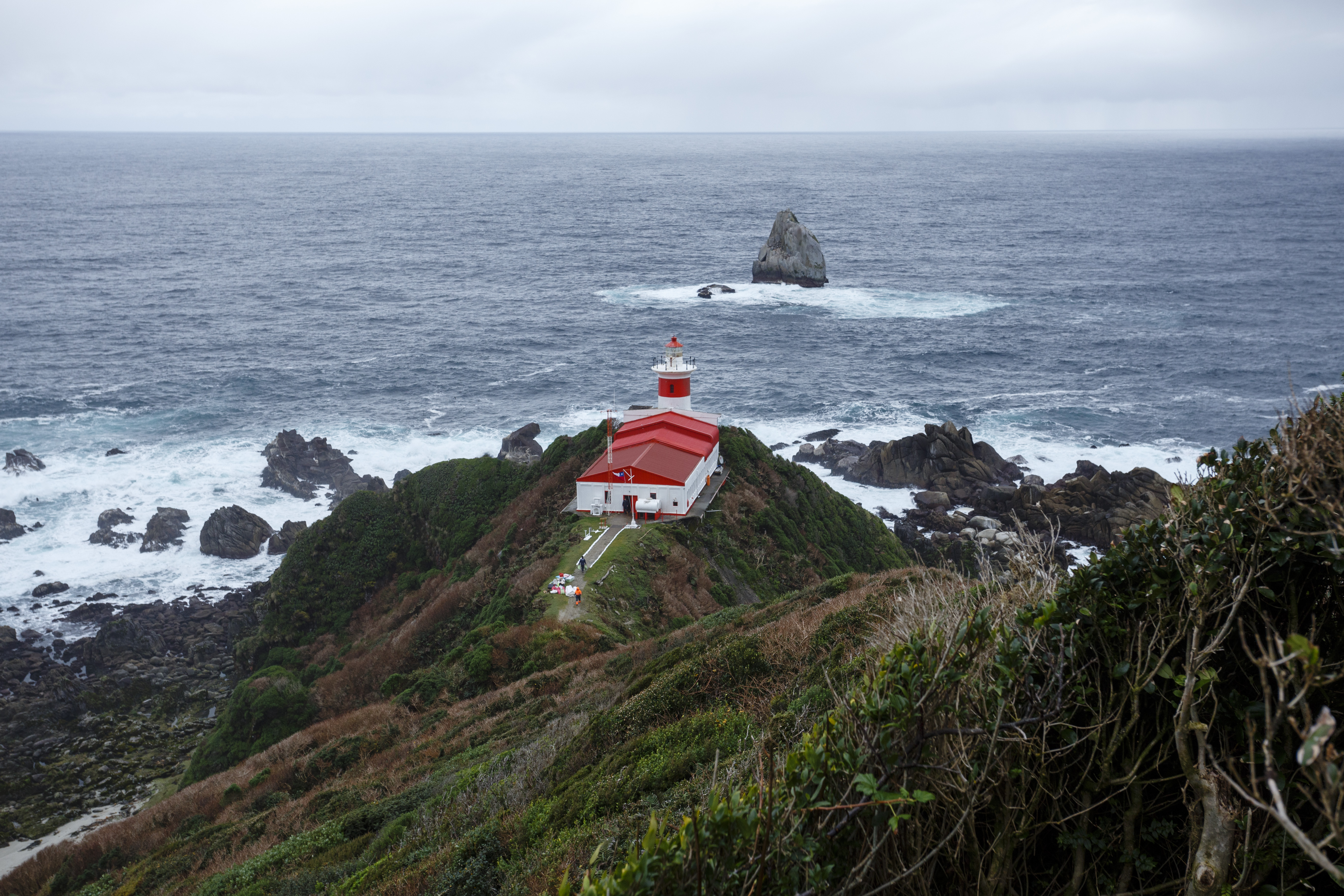 Faro Cabo Raper, en península de Taitao, Región de Aysén. Chile